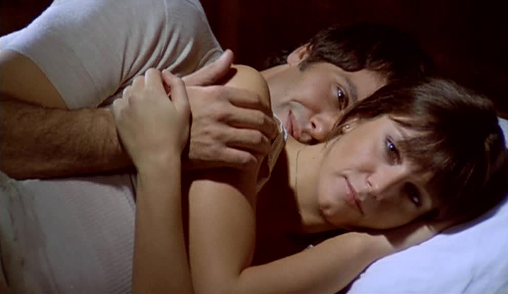 Screenshot di Giuliano Gemma e Stefania Sandrelli nel film Delitto d'amore (1974), regia di Luigi Comencini